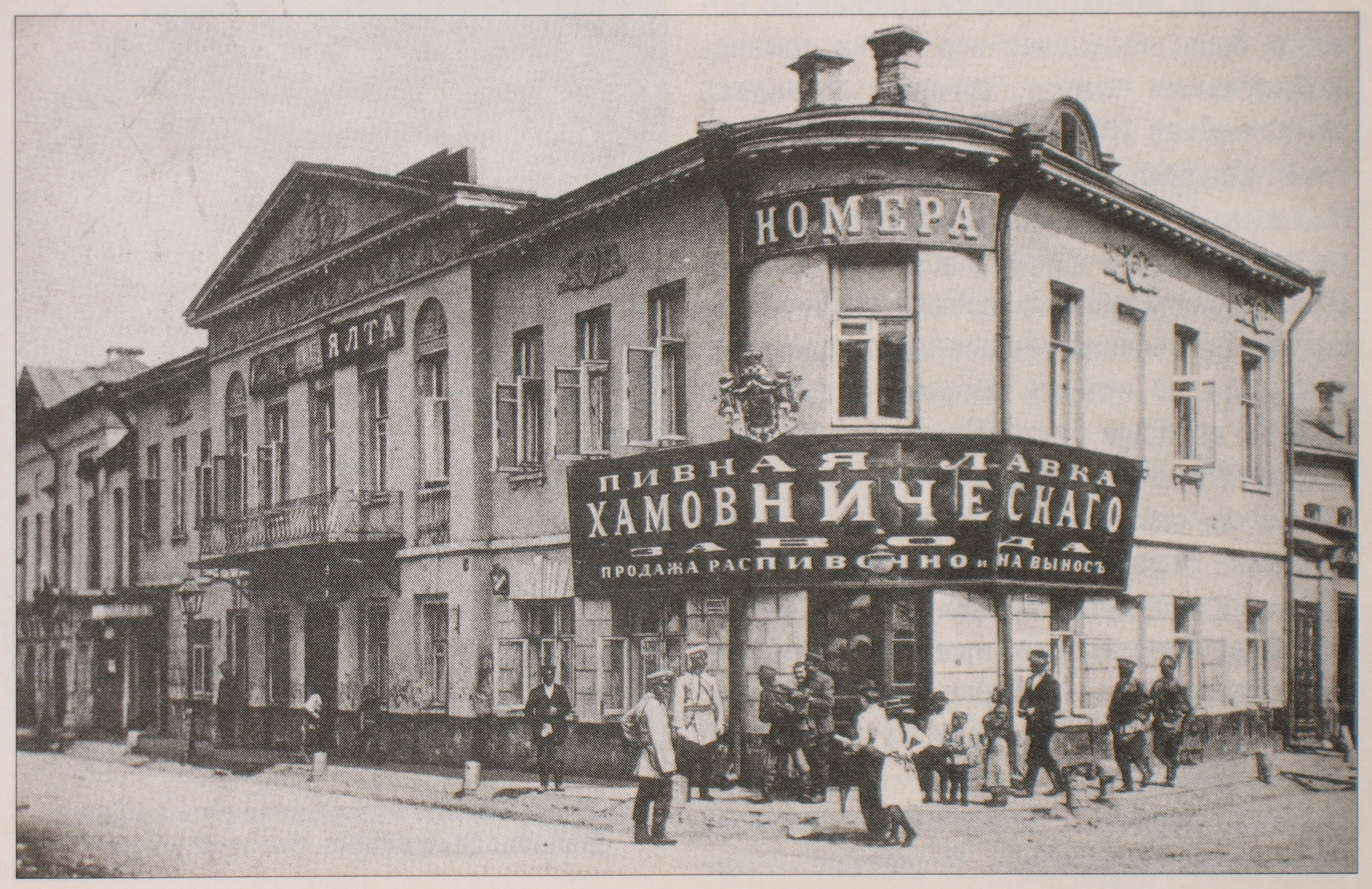 Меблированные комнаты "Ялта" (номера) на площади Смоленского рынка. На углу пивная лавка Хамовнического завода. Открытое письмо Российской Империи.